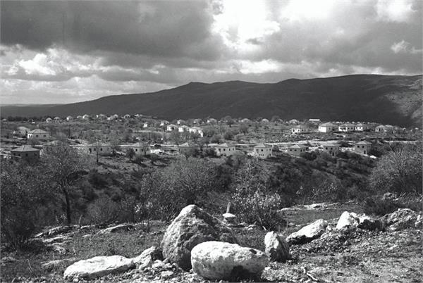 טבעון - מראה כללי